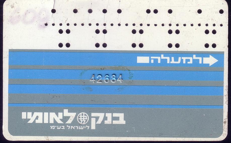 כרטיס כספומט דגם ראשון, כרטיס מנוקב ללא פס מגנטי, צד חזית